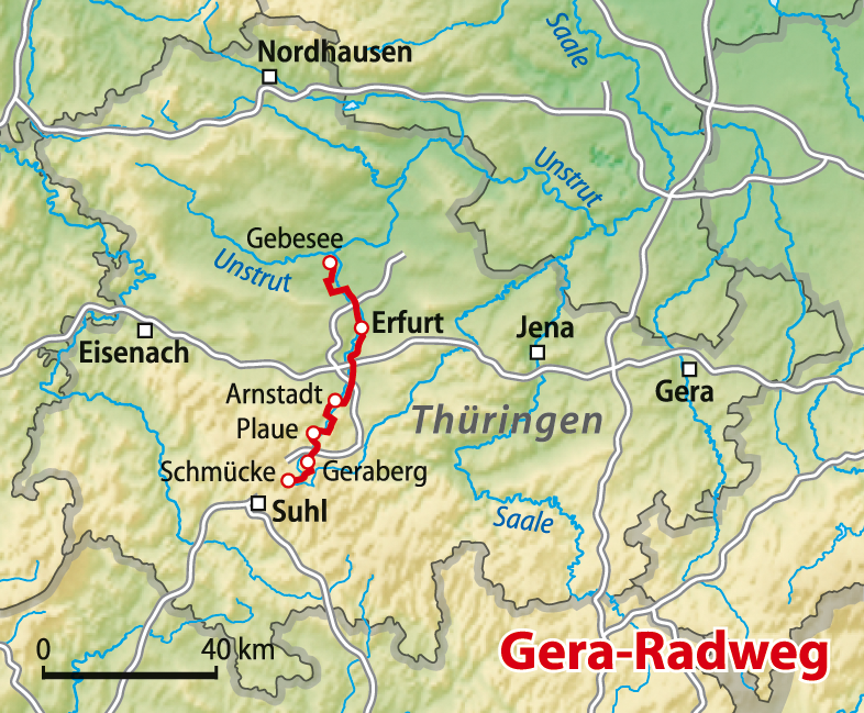 Verlauf des Gera-Radwegs